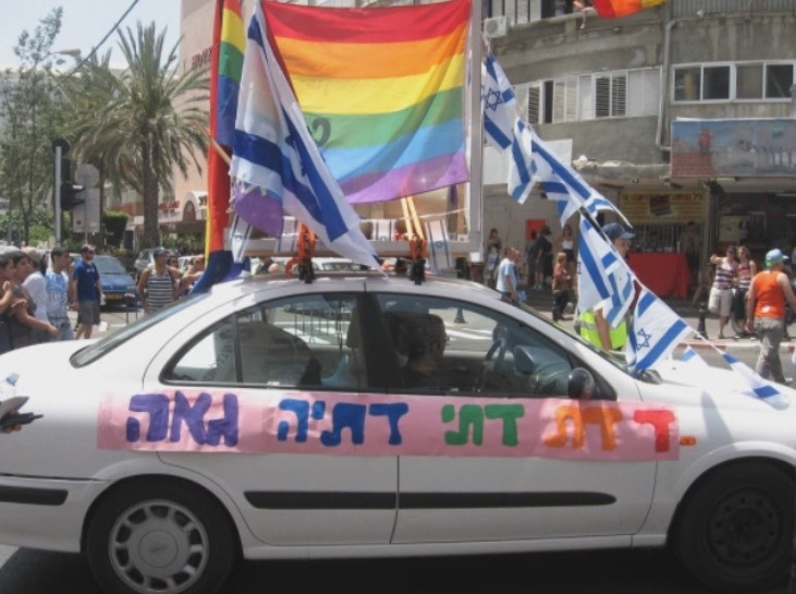 דתיים גאים במצעד הגאווה בתל אביב - 2010